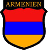 Oʻzbekcha/ўзбекча: Arman millatiga mansub vermaxt legionerlarining bilak nishoni